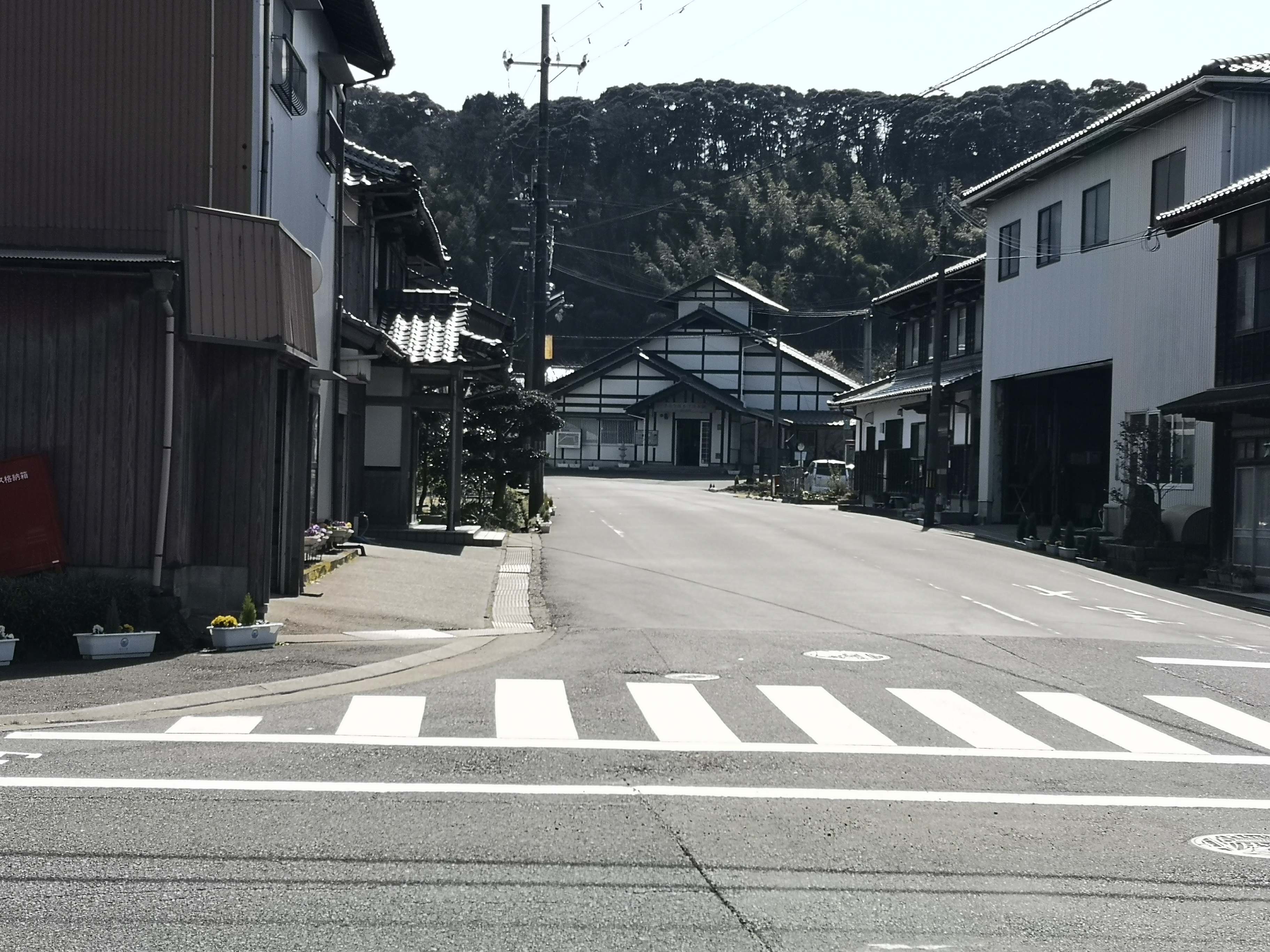 R178から見た夕陽ヶ浦木津温泉駅